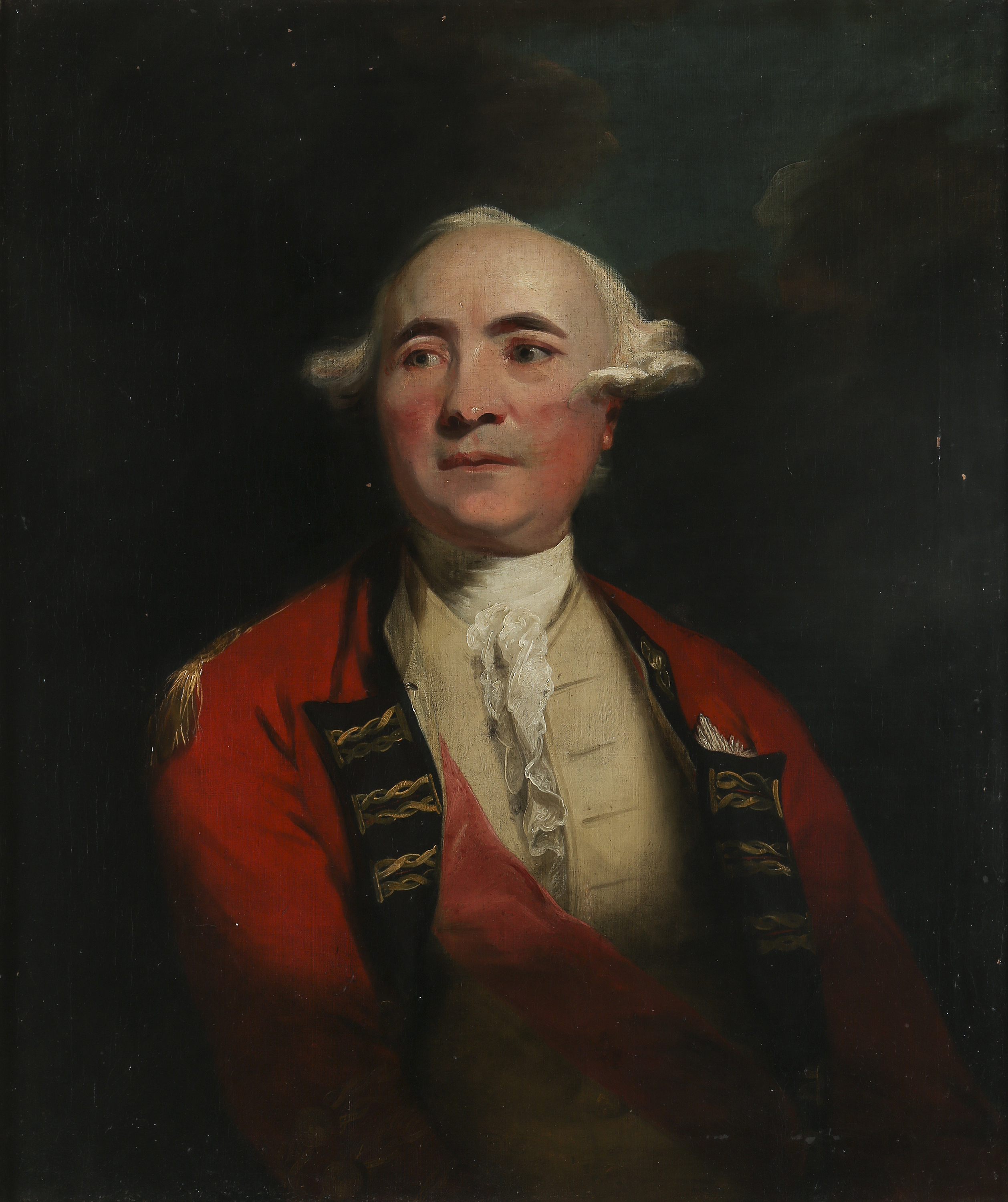 Porträtt av sir Frederick Haldimand bärandes uniform, troligen för en Generalguvernör. Över bröstet kan man se det röda bandet för Bathorden, och på hans vänstra bröst kan ordensstjärnan skymtas. Målningen är från 1780-talet och troligen av sir Joshua Reynolds.